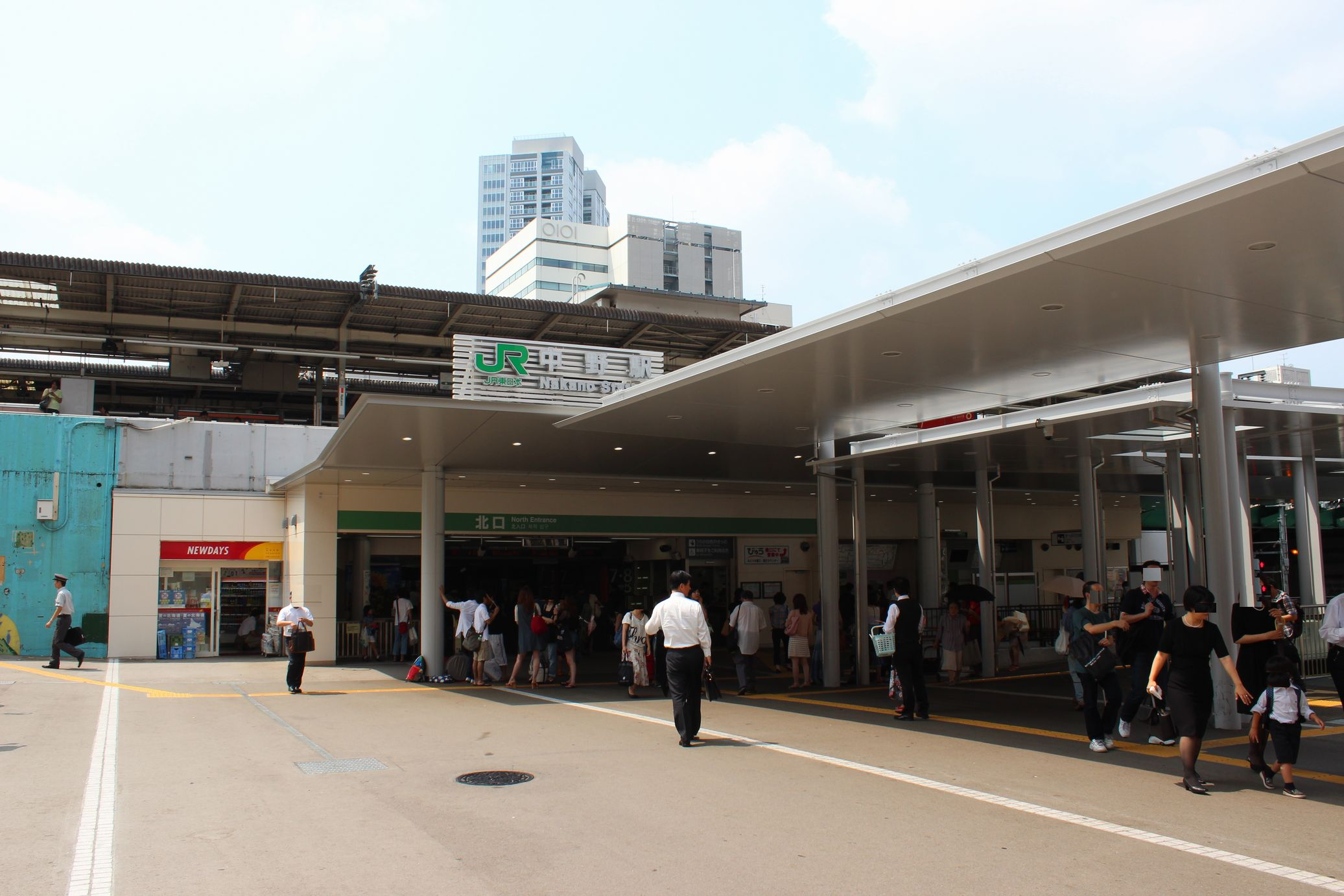 JR東日本 中野駅北口